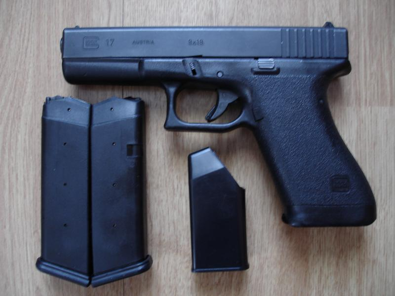 Glock 17 9mmPara (erste Ausführung - Februar 1986)